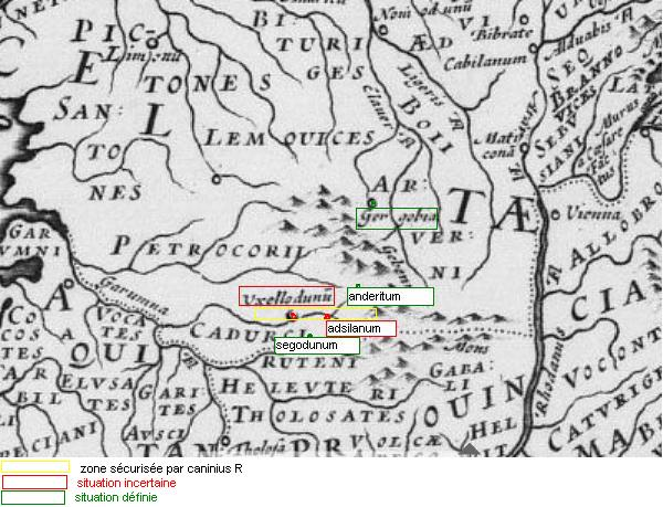 Uxellodunum placé en triangulation entre le Lot et Gergovie qui sont situés correctement. Ensuite la rivière Colagne plus Anderitum dont la situation est prouvée et Segodunum idem, vient s'intercalée entre ces 2 dernières, Adsilanum ou Ad-Silanum située selon les cartes du 17ème à proximité du Lot et de la Colagne, sachant que la vallée du lot et tous les contreforts du massifs central étaient contrôlés par Caninius Rébilus. Licensing Catégorie:Cartes Histoire de France